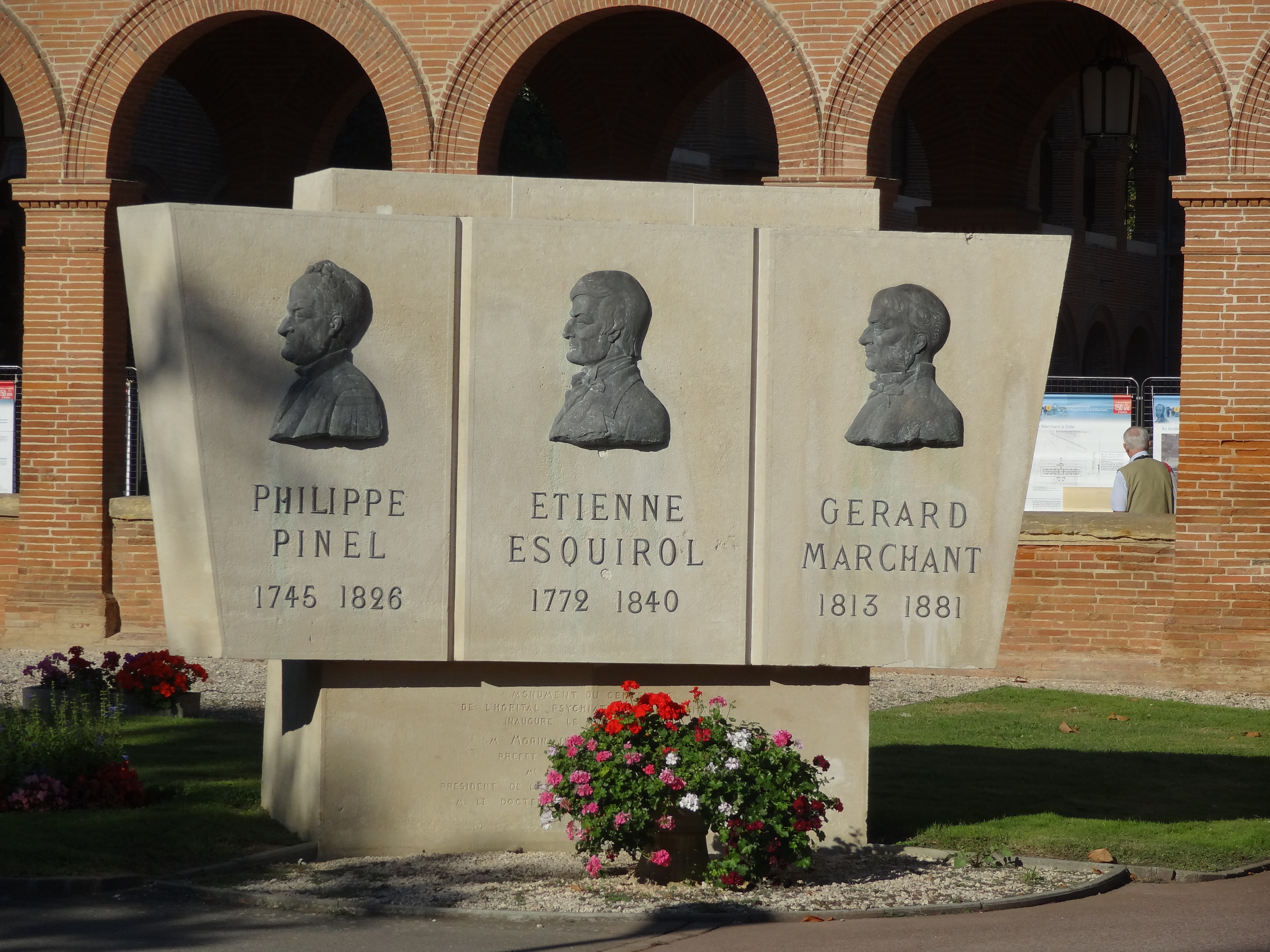 Centre hospitalier Gérard Marchant, à Toulouse, fortement endommagé par l'explosion de l'usine AZF en septembre 2001 .